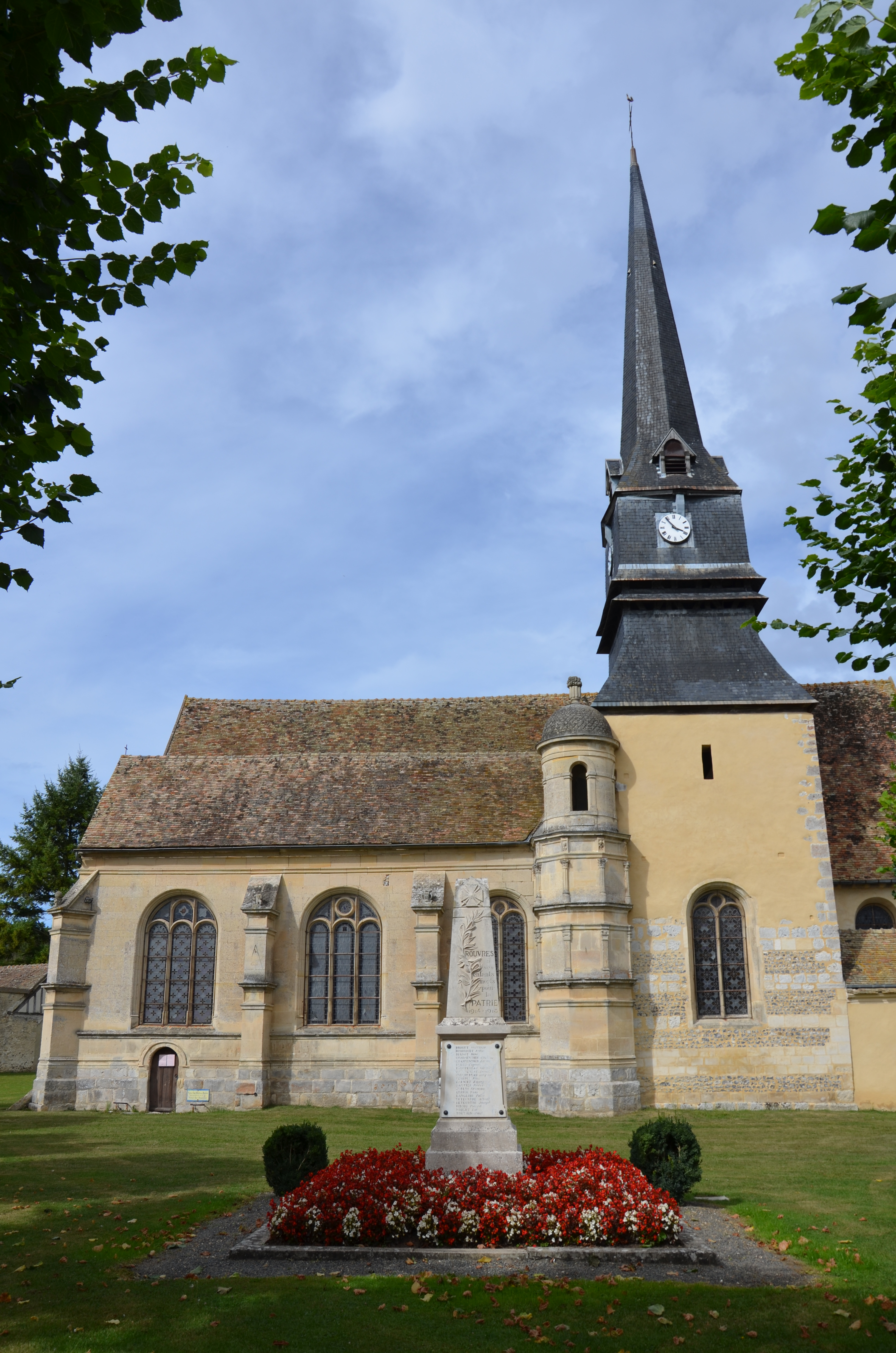 Église Saint-Martin de Rouvres (Classé) .